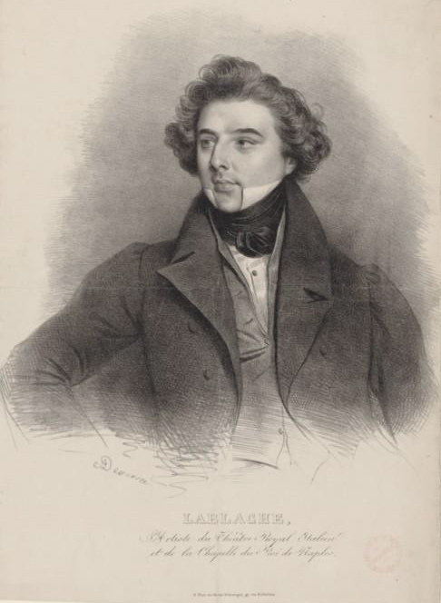 Lablache, artiste du Théâtre royal italien et de la Chapelle du roi de Naples